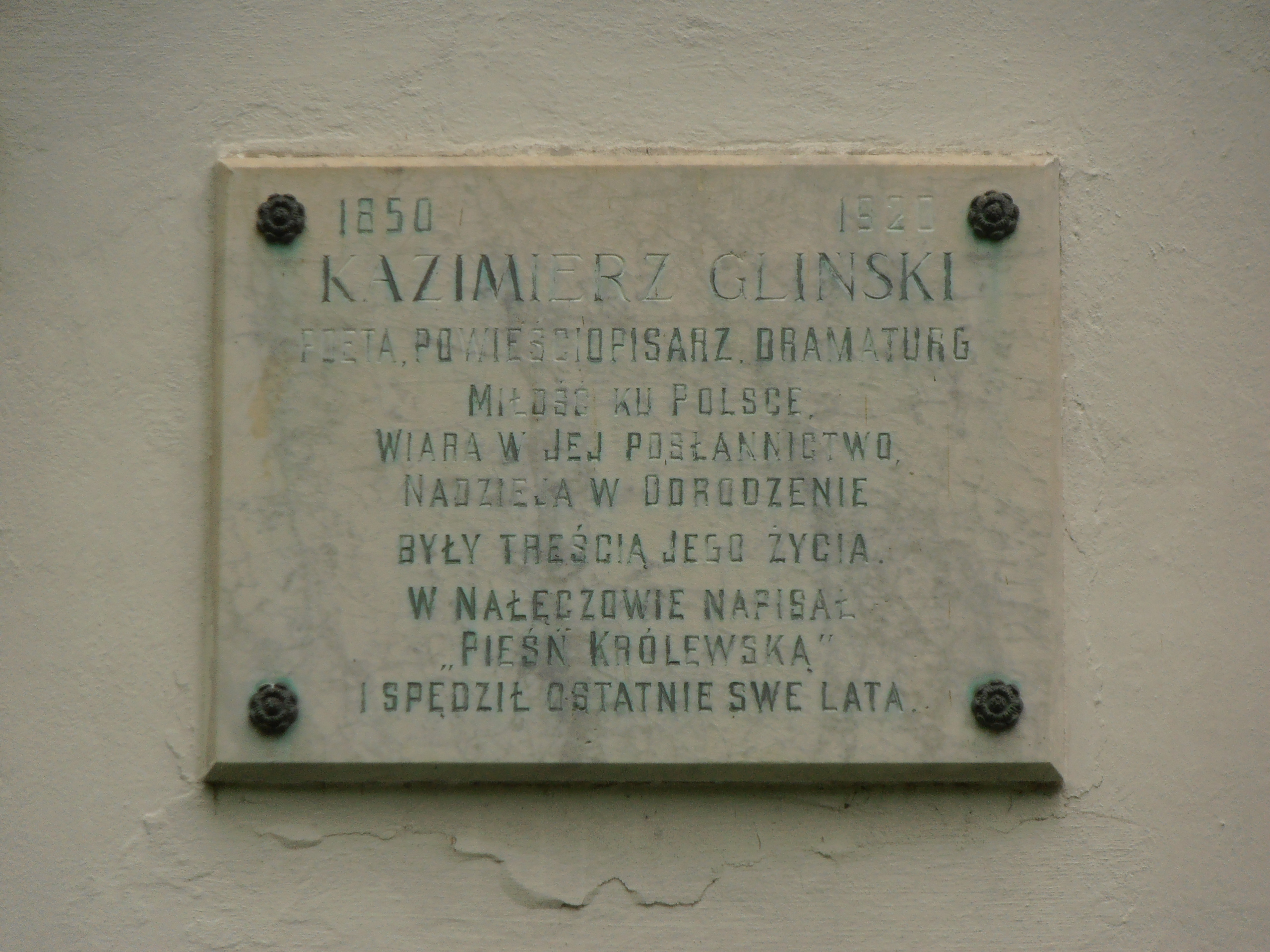 Nałęczów. Tablica poświęcona Kazimierzowi Glińskiemu na pałacu Małachowskich.